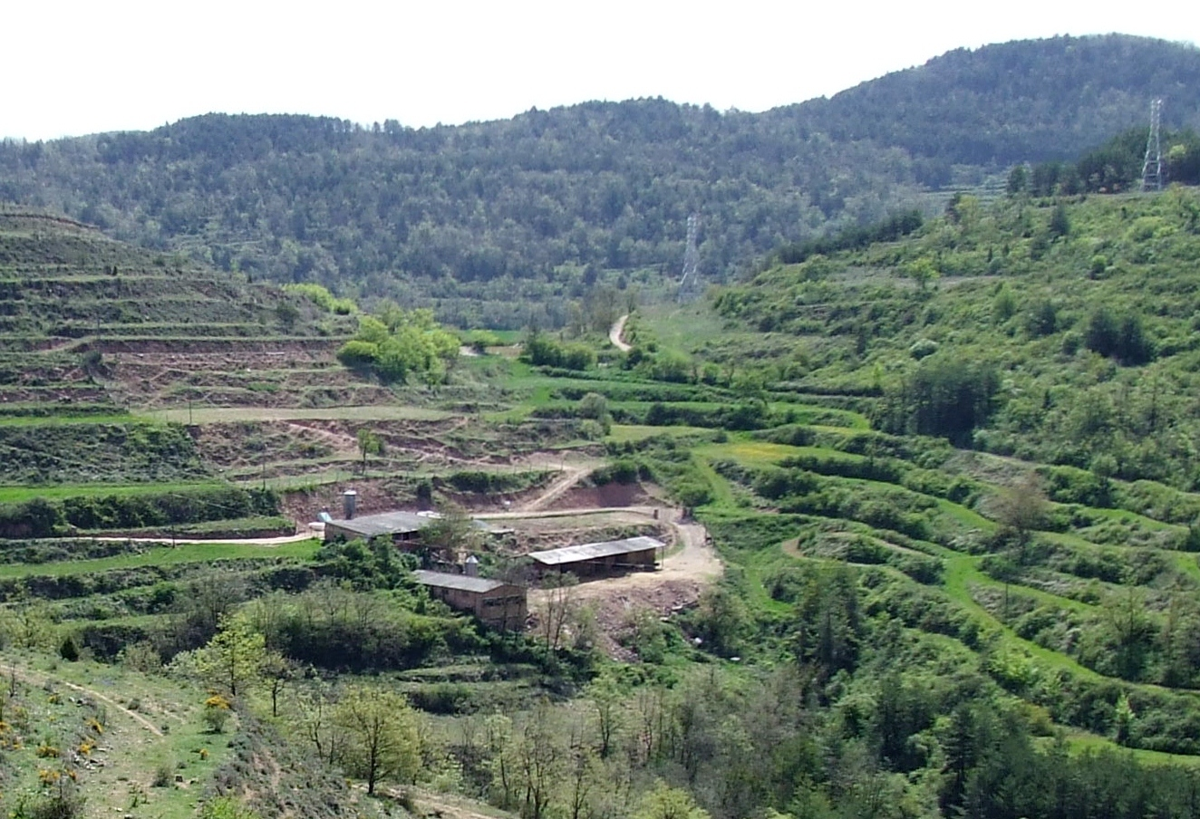 Cal Parrella (l'Estany, Moianès)